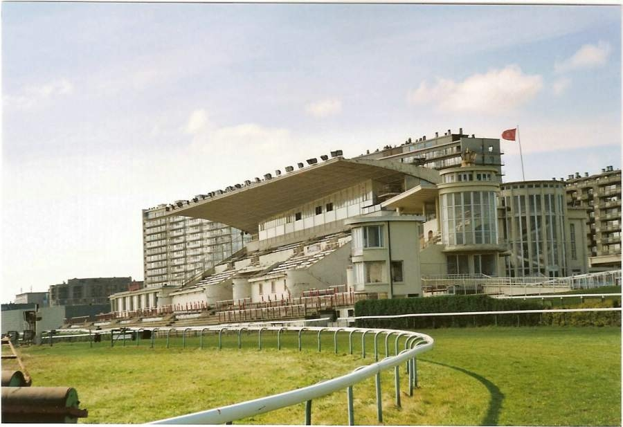 Hippodroom Oostende